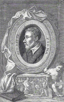 Giovan Battista Pigna, incisione